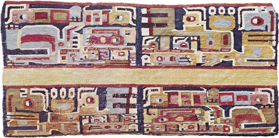 Fragment de tissu du Pérou, Tiwanaku (1000-1300), Collection Dumbarton Oaks, Washington, DC, 34,4 × 16,5 cm.